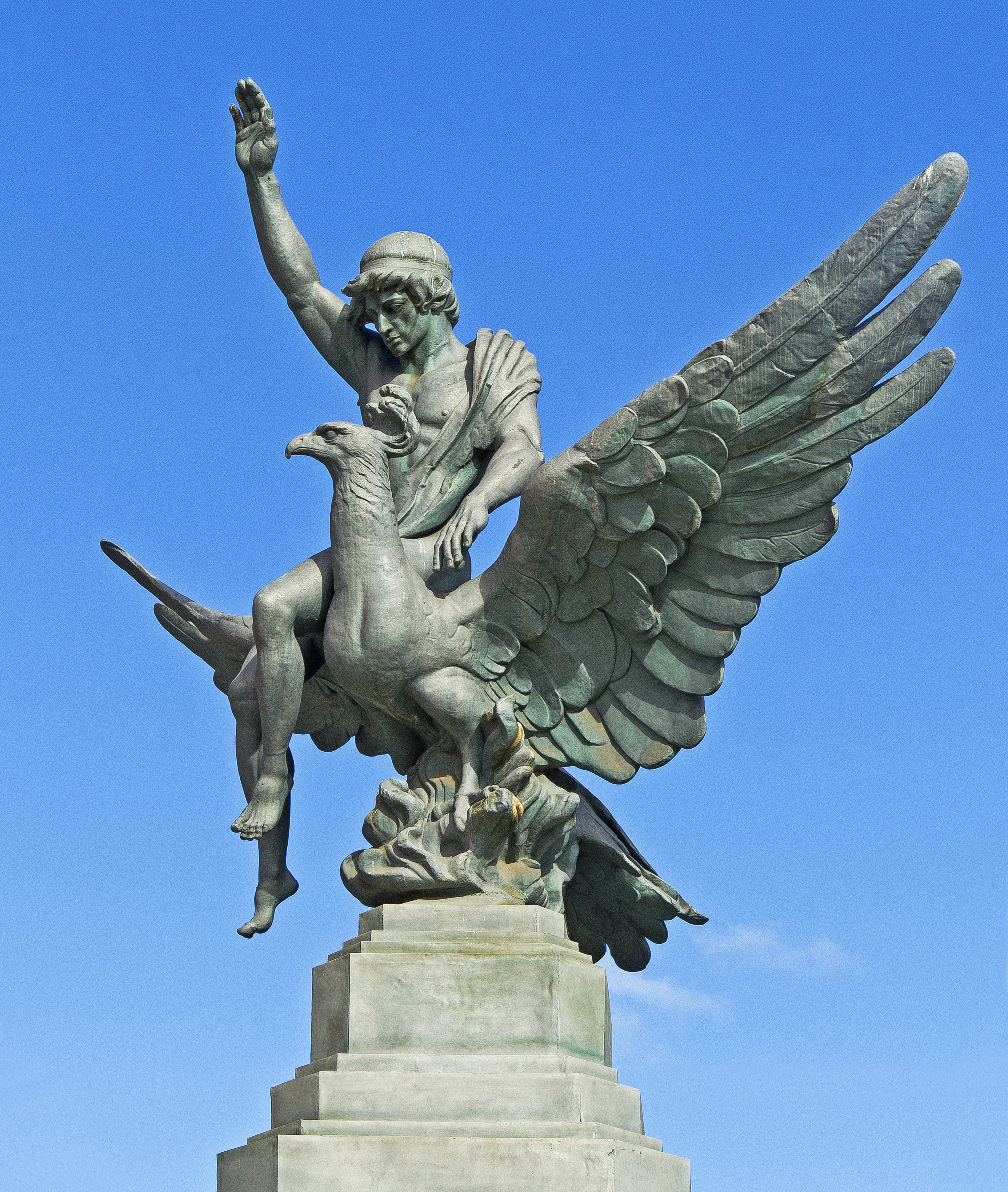 Die Plastik „La Unión y el Fénix“ die zwischen der Avenida Guimerá und der Calle de Imeldo Seris in Santa Cruz de Tenerife steht, war der krönende Abschluss des Gebäudes einer Versicherungsgesellschaft.